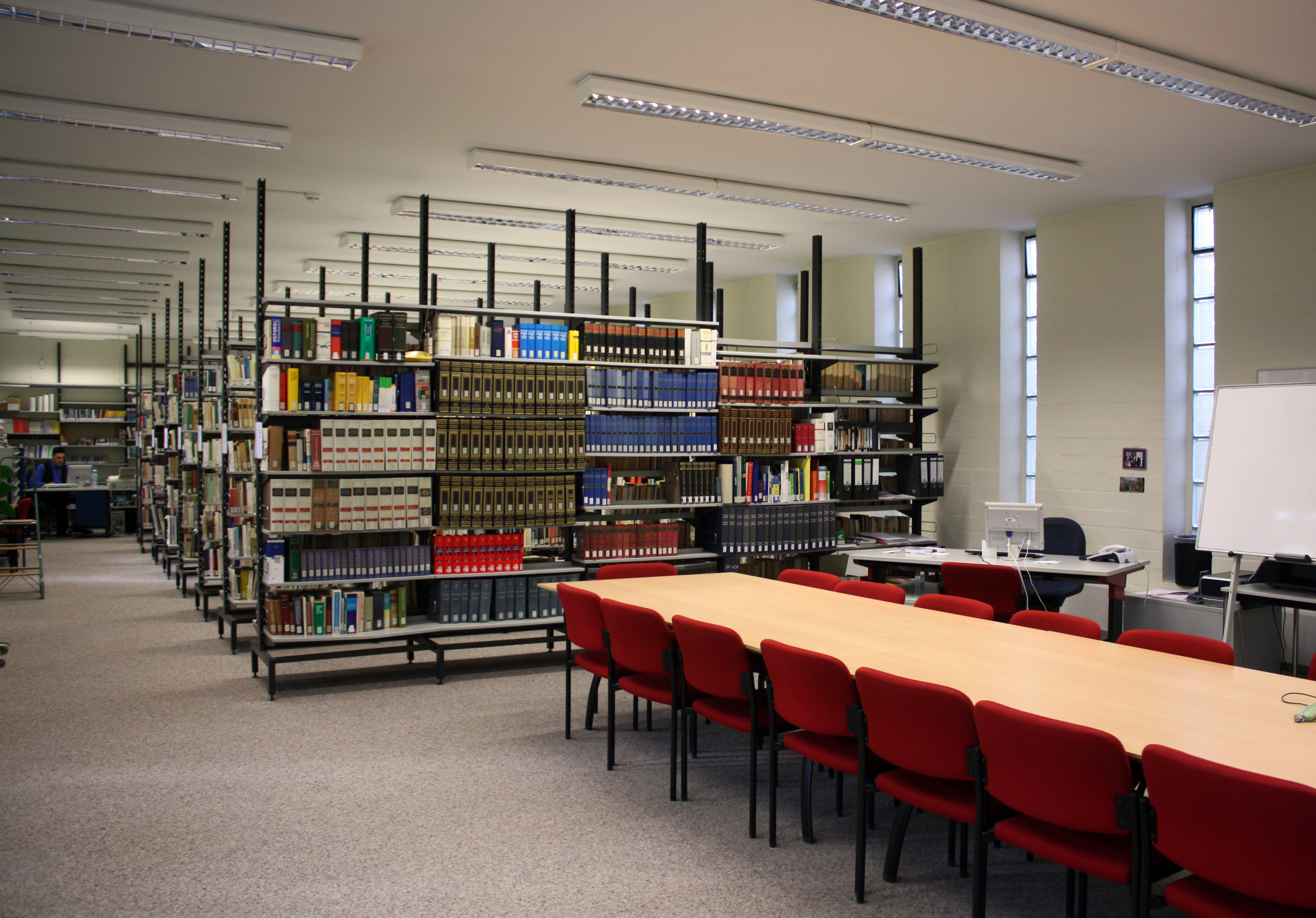 Italienisches Konsulat und Kulturinstitut, Köln